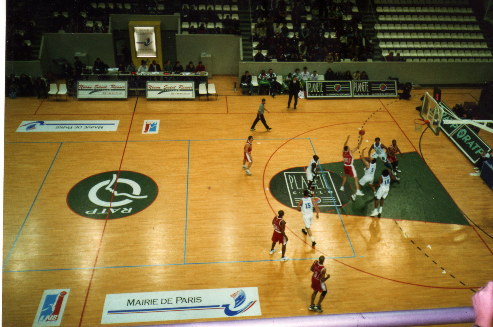 Match de Pro A entre le Paris SG Basket et l'Elan Chalon en 1997